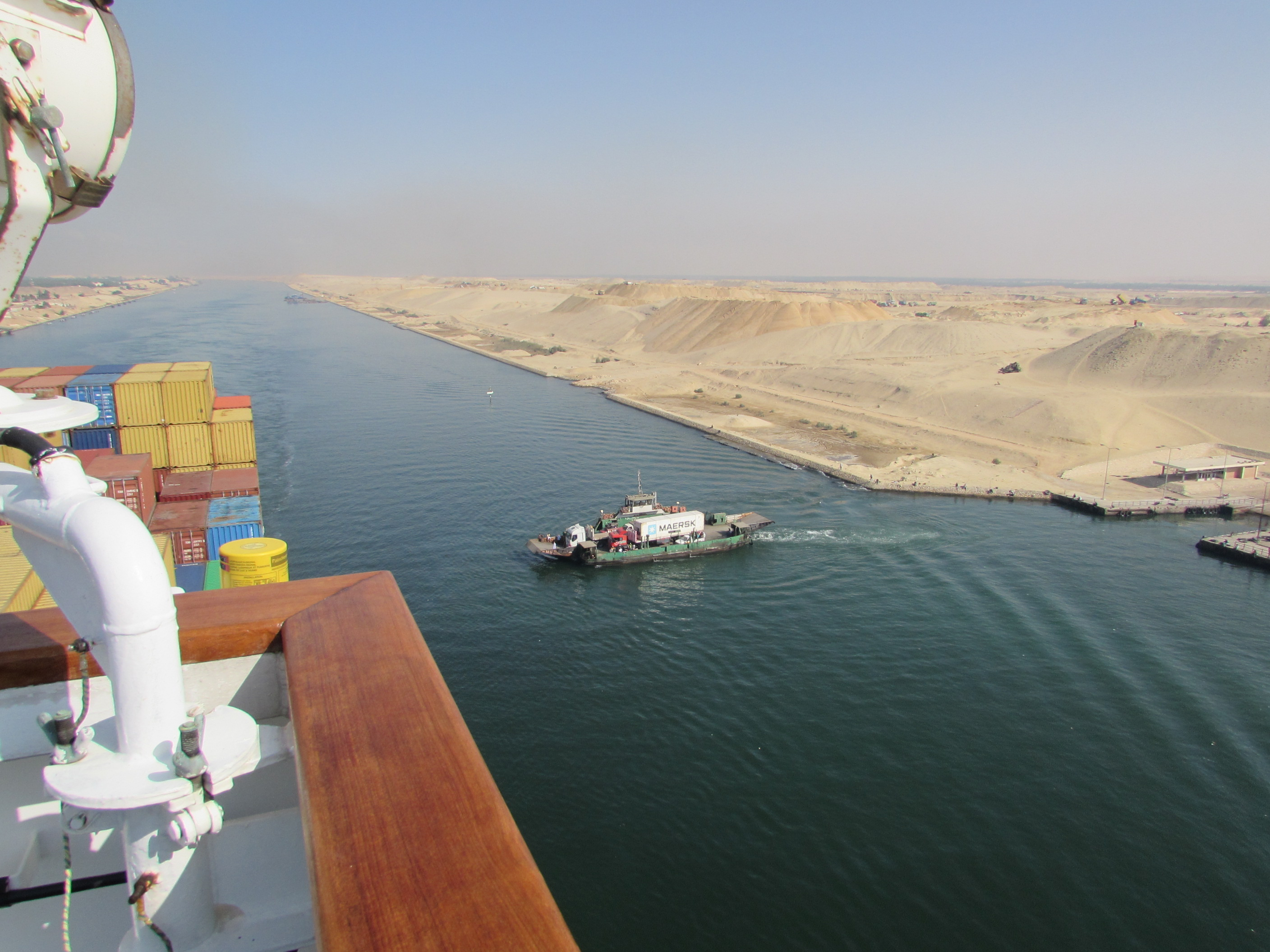 lkw-fähre im suezkanal